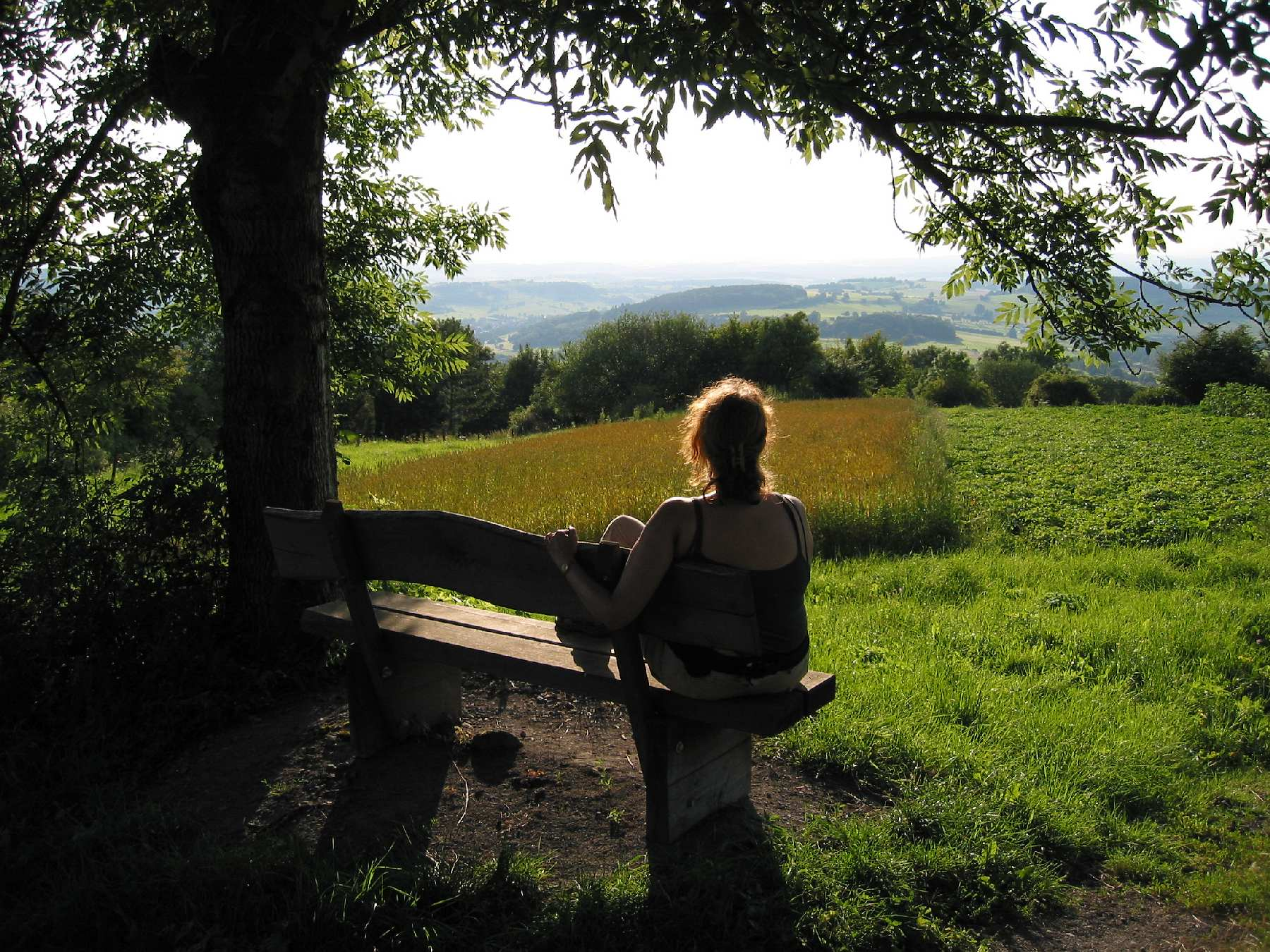 Wandern auf dem Vulkanring Vogelsberg - Rast auf dem Schlossberg in Ulrichstein